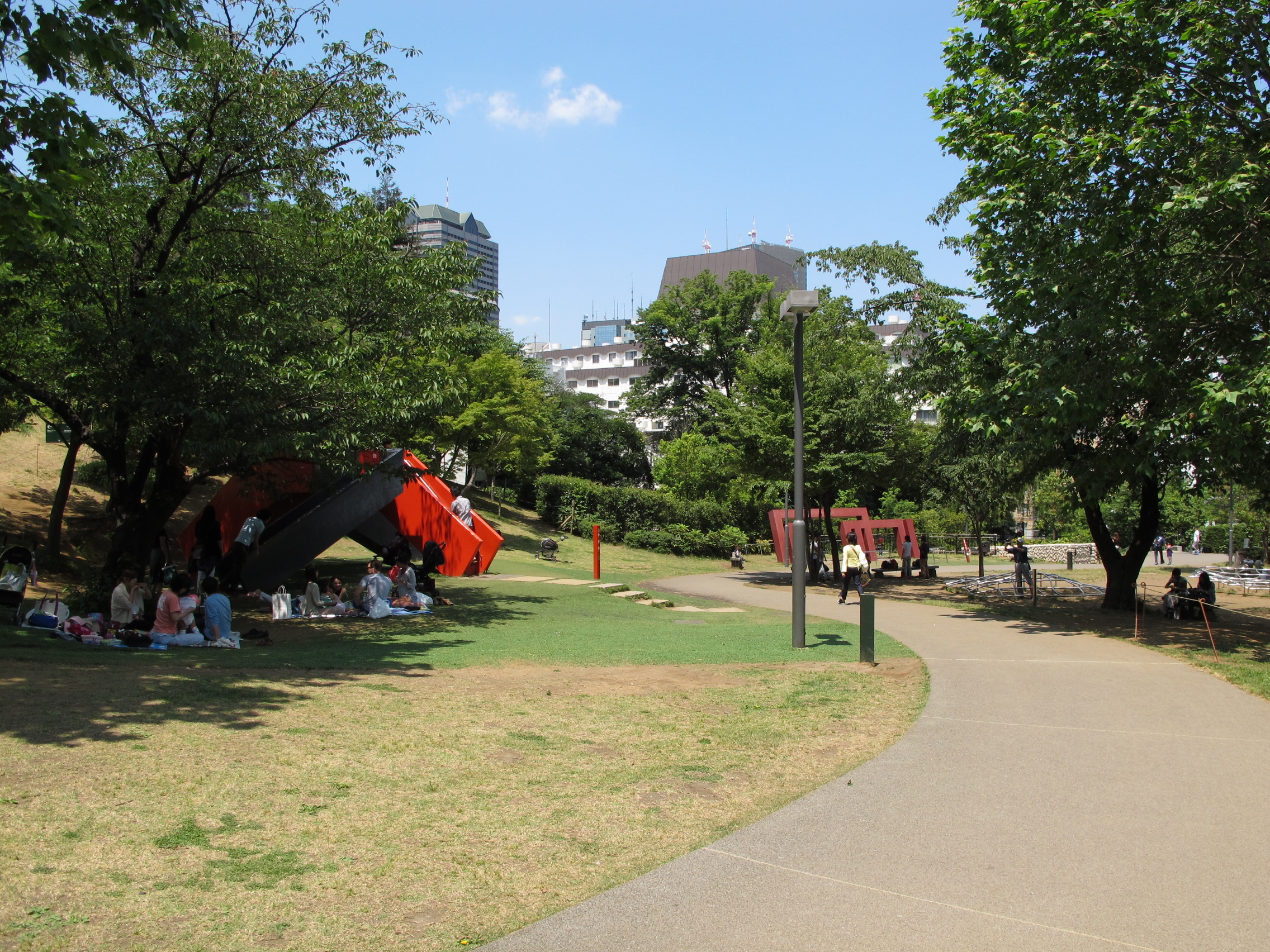 Hinokicho Park View